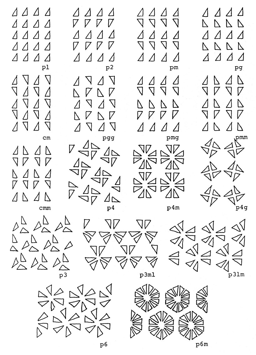 A 17 síkbeli szimmetriamintázat